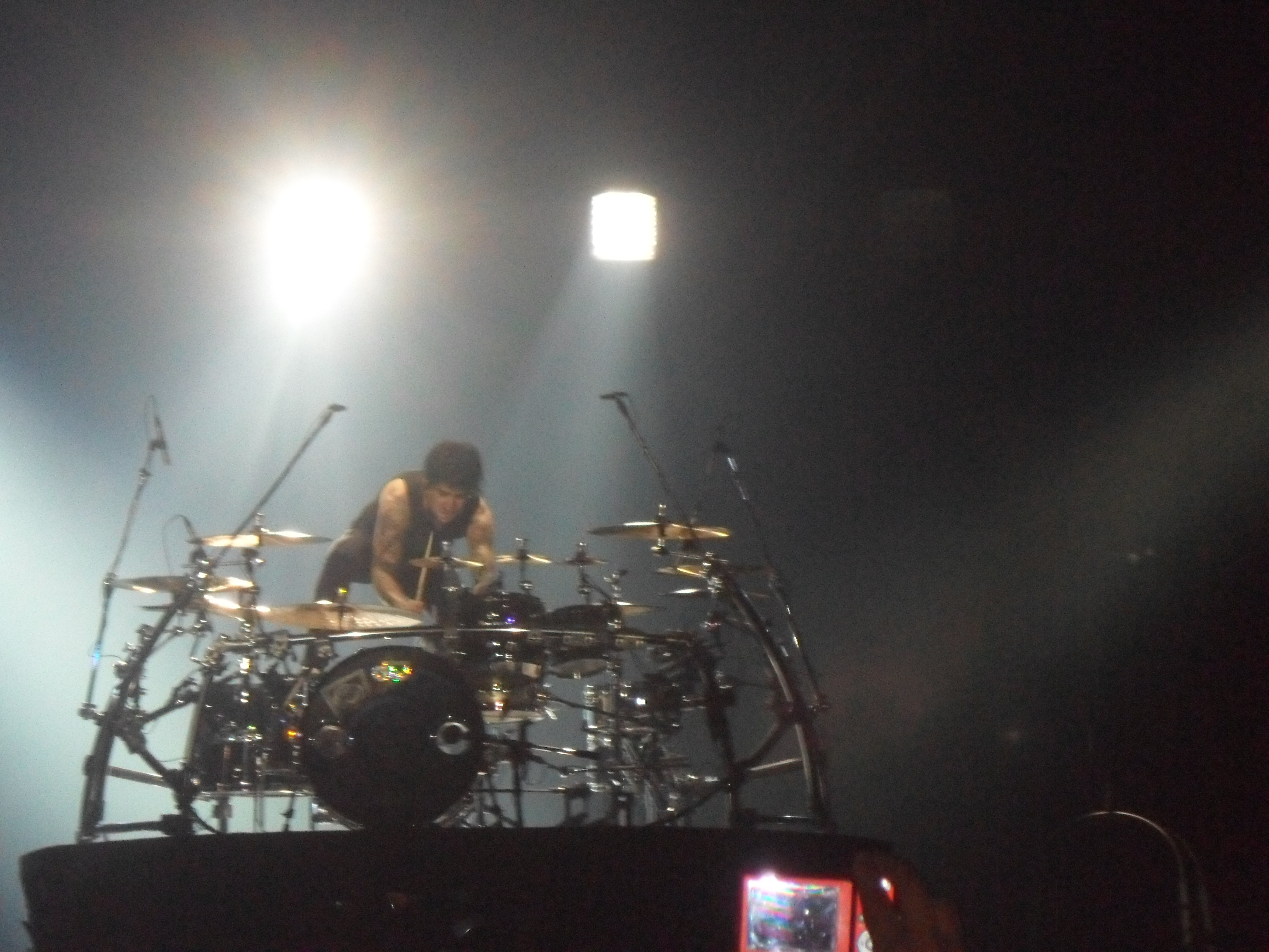 Alejandro González Trujillo, batería de Maná